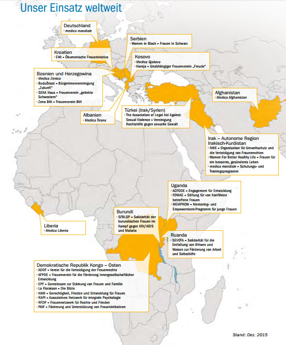 Projektkarte medica mondiale.